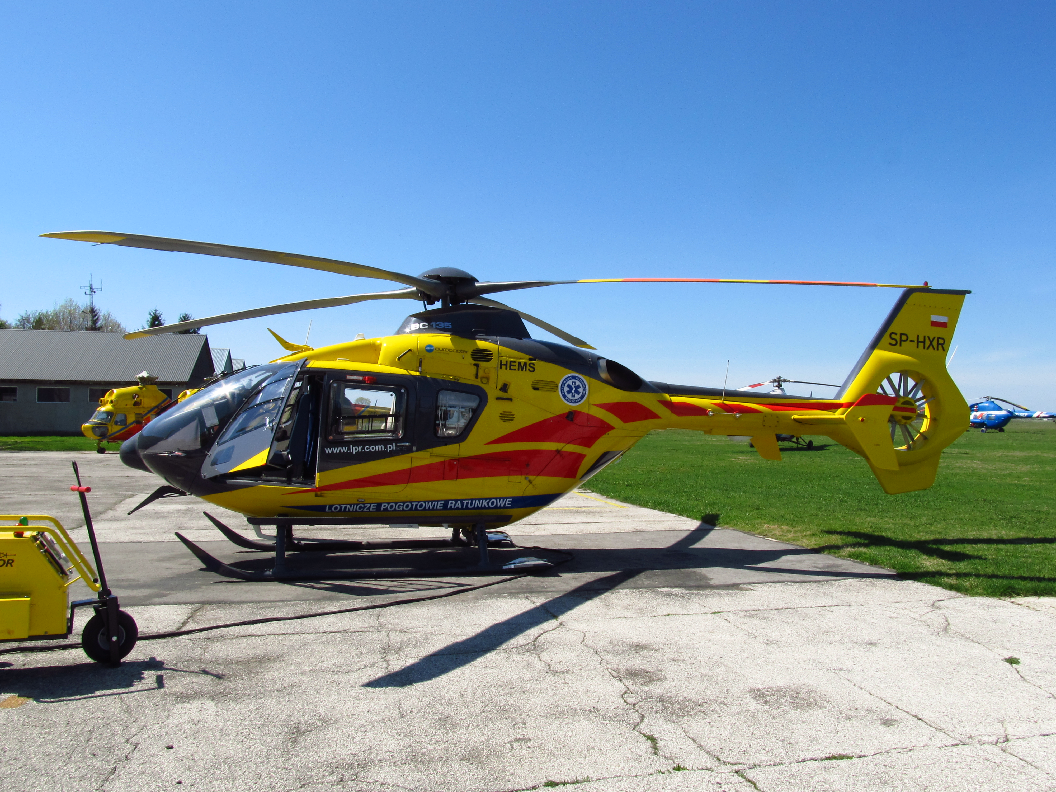 Śmigłowiec EC-135 Lotniczego Pogotowia Ratunkowego mający stałą bazę na lotnisku aeroklubowym "Radawiec" pod Lublinem.